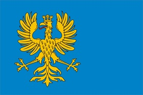 Rekonstrukcja flagi Księstwa Cieszyńskiego z 2016 roku.